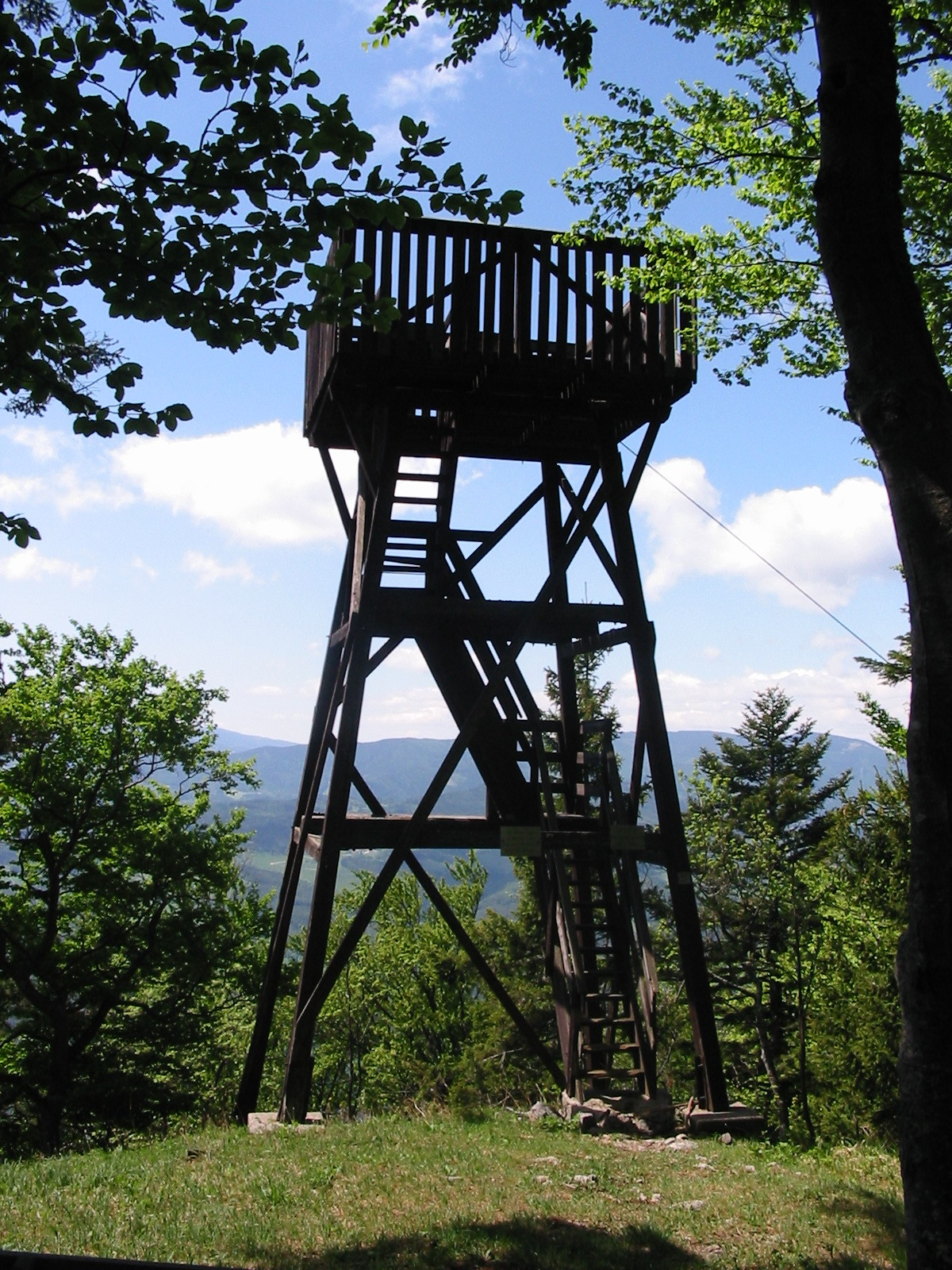 Schöberlwarte